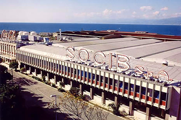 Reggio Calabria - stabilimento SOCIB (CocaCola)